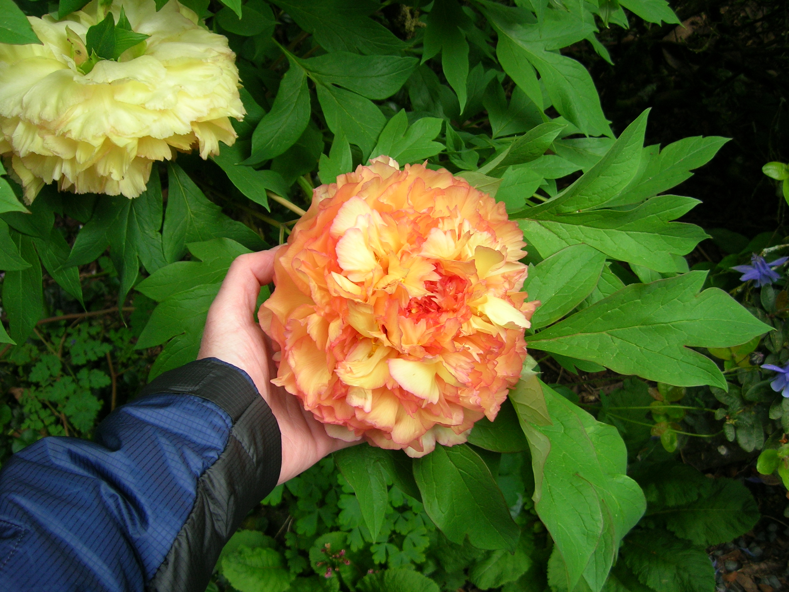 i110405 043